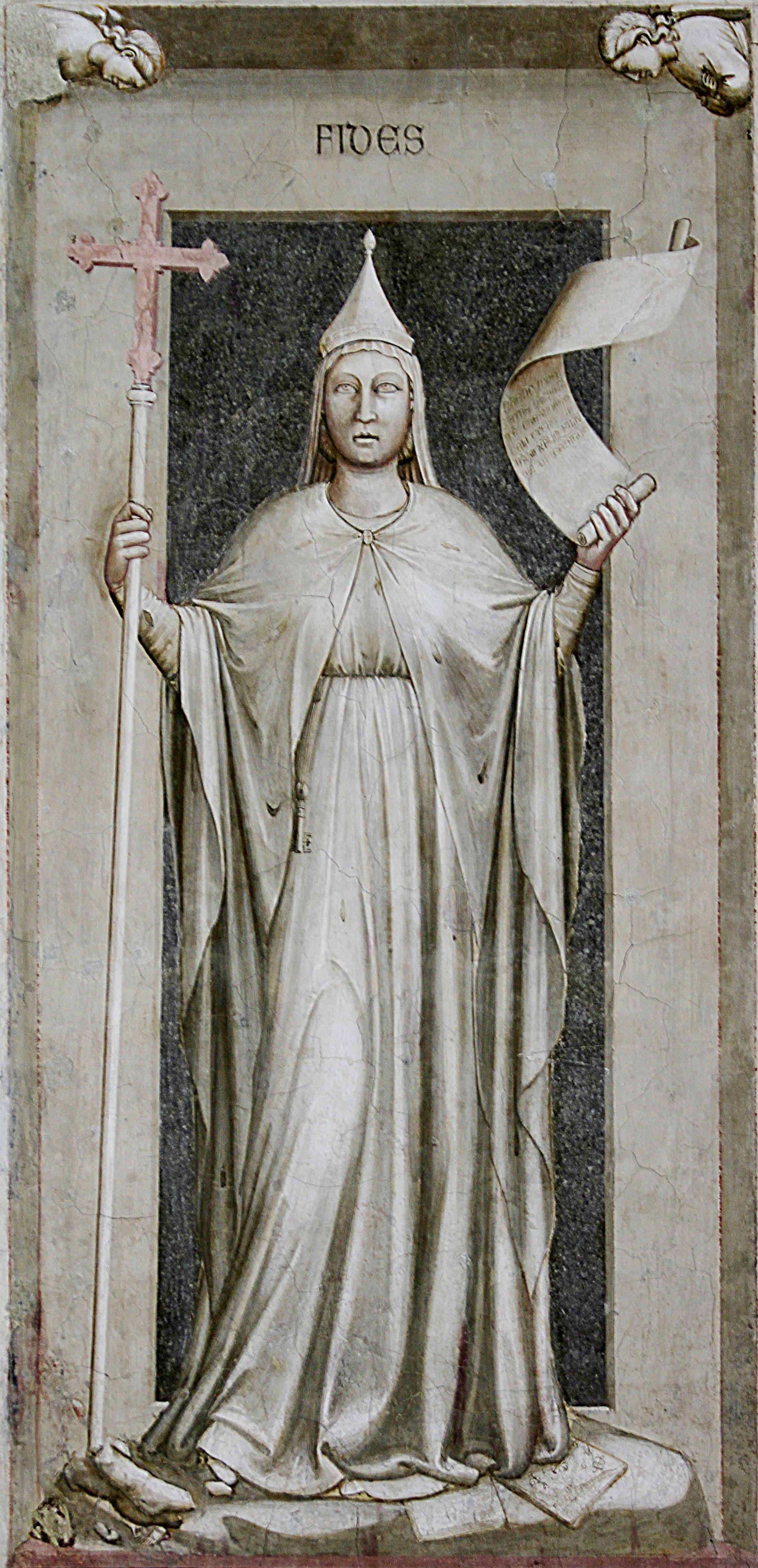 Capella dei Scrovegni - Padua